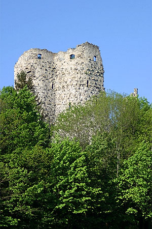 Wohnturm der Ruine Pfeffingen